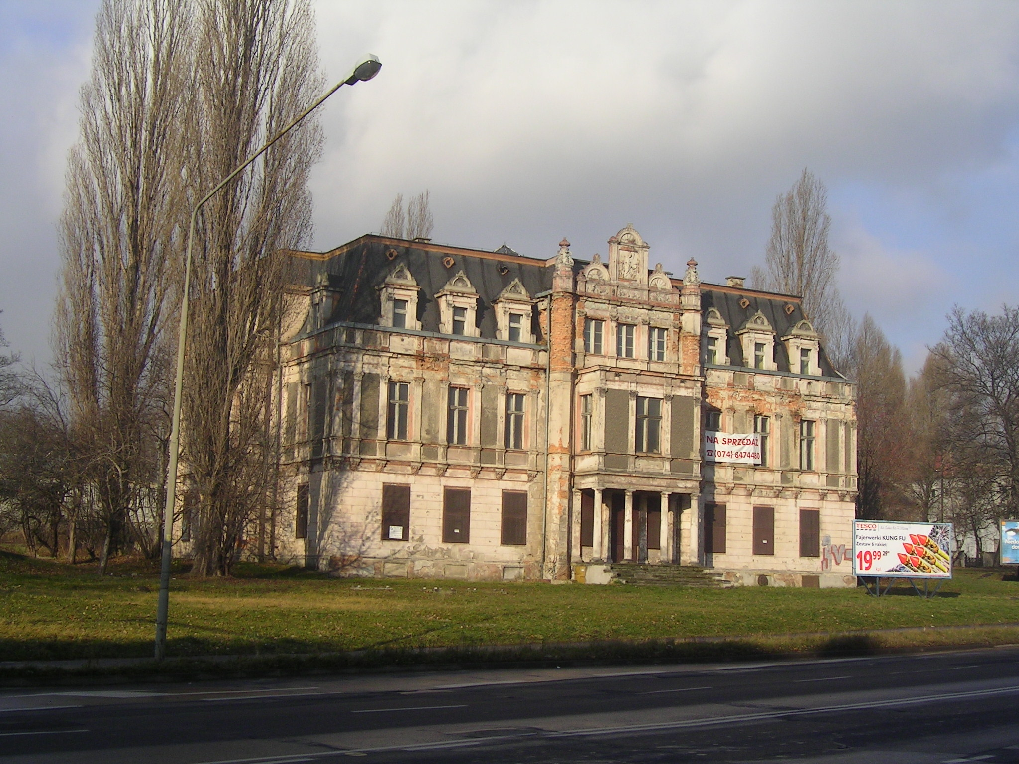 Wałbrzych - Stary Zdrój dawny pałac Tielscha ul. Armii Krajowej autor: Radwa